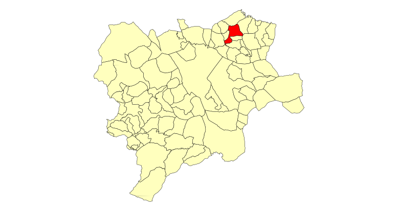 Mapa municipal de Albacete con el municipio de Fuentealbilla resaltado en rojo.